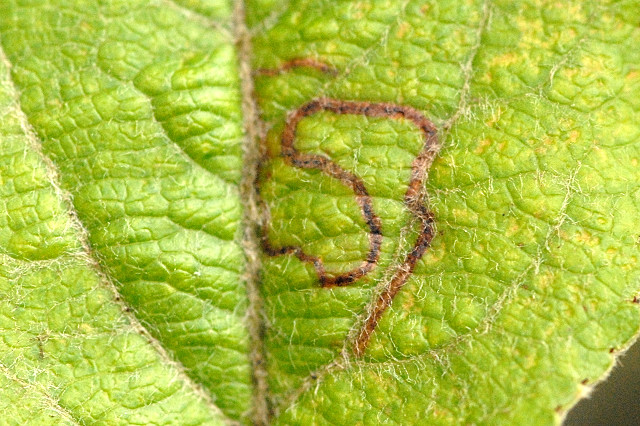 Stigmella incognitella from Commanster, Belgian High Ardennes .